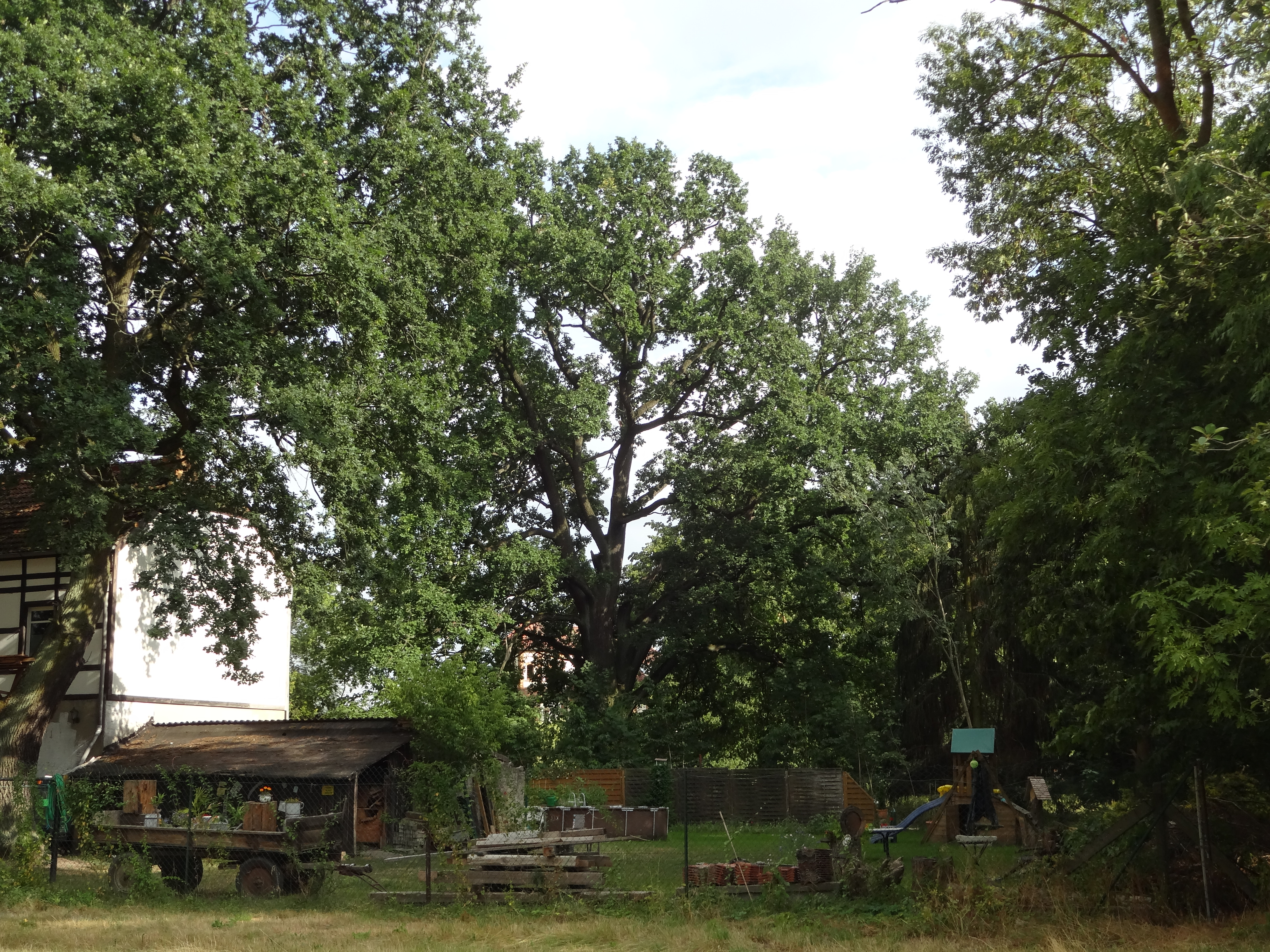 als Naturdenkmal geschützte Stieleiche Hauptstraße 27, Baum südlich des Hauses